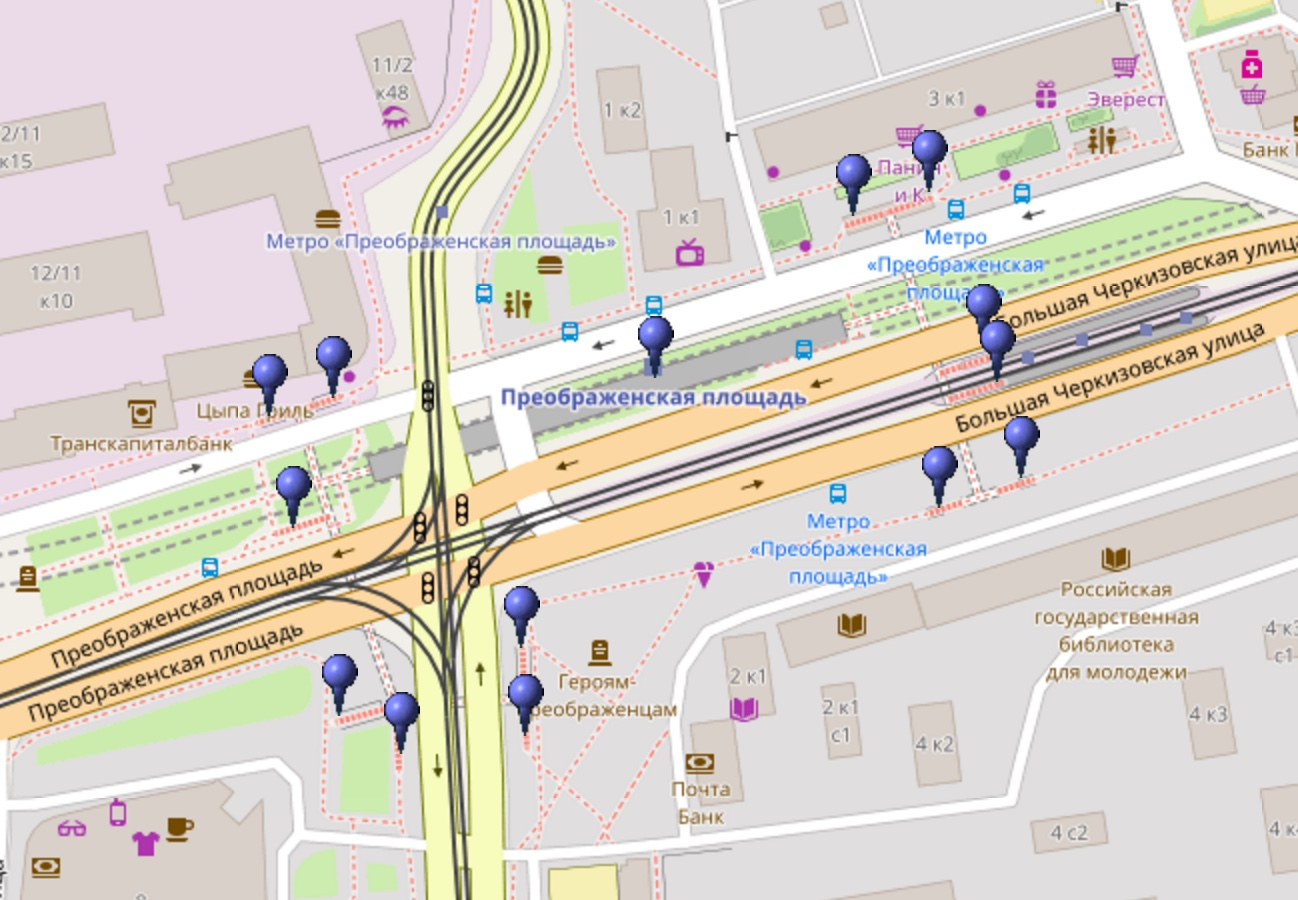 Plan de situation de la station Preobrajenskaïa plochtchad (métro de Moscou) et de ses treize bouches.